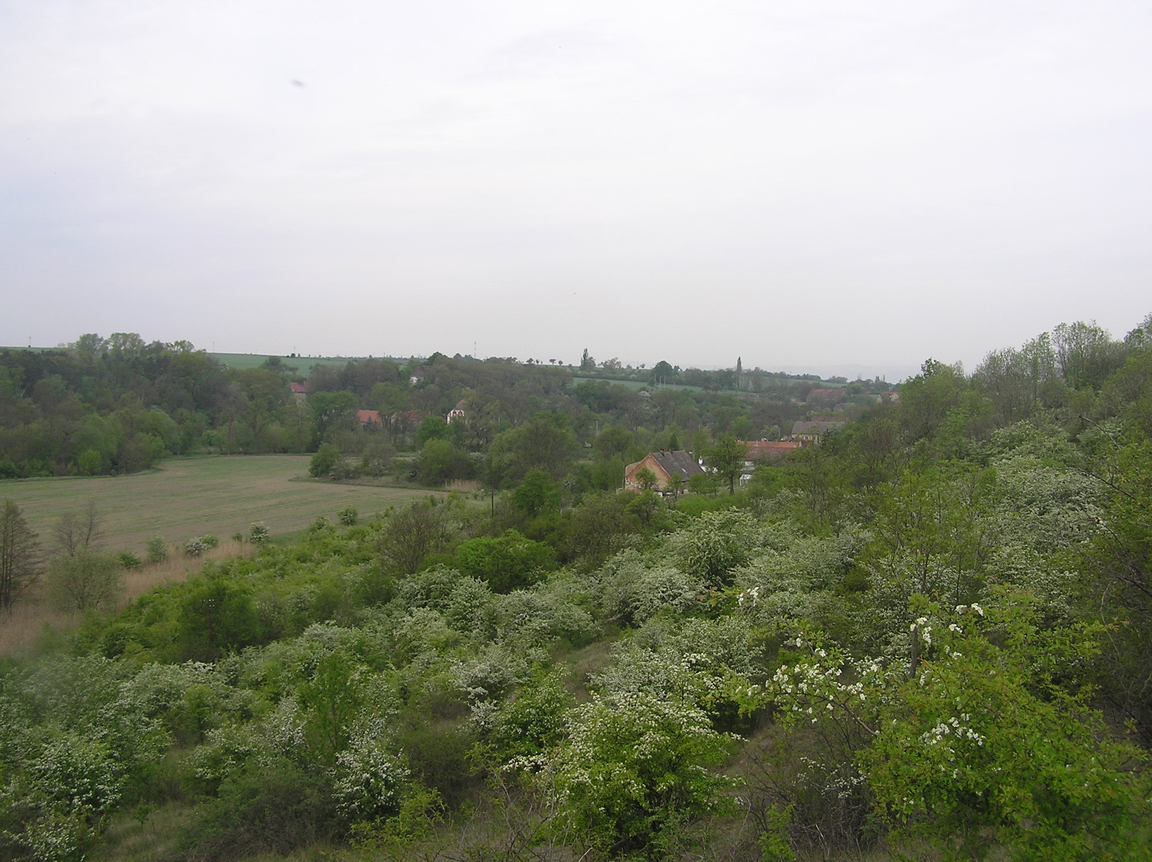 Minice od Nehasic